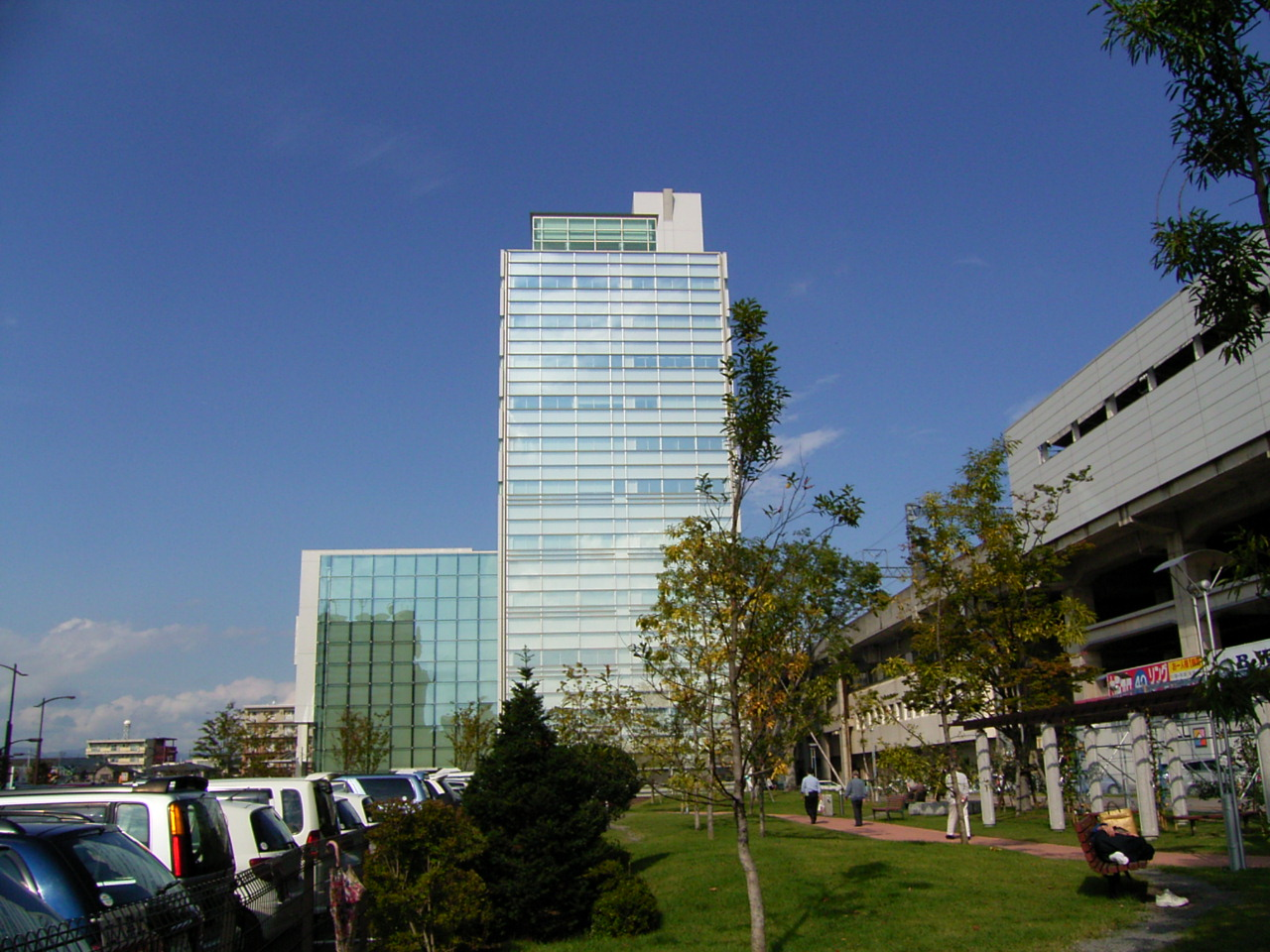 福島駅西口の北に建つコラッセふくしま